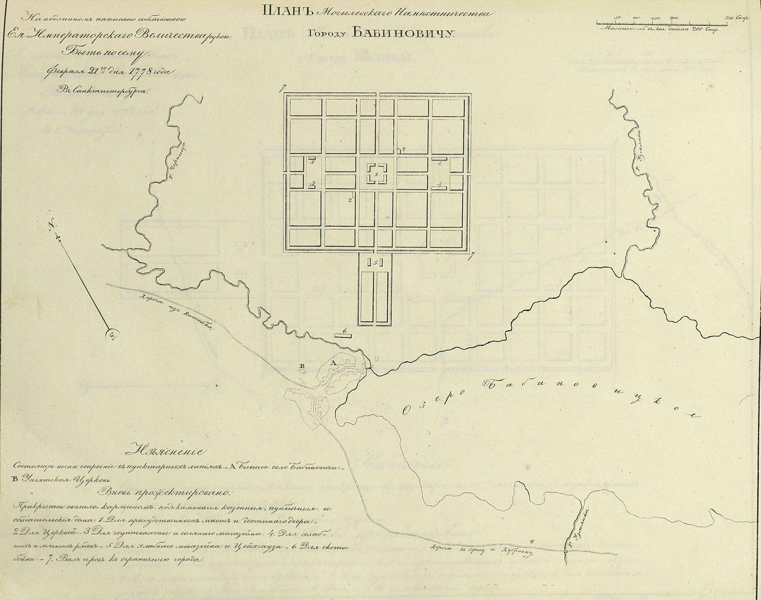 Беларуская (тарашкевіца): Бабінавічы (Babinavičy). Плян места, праект